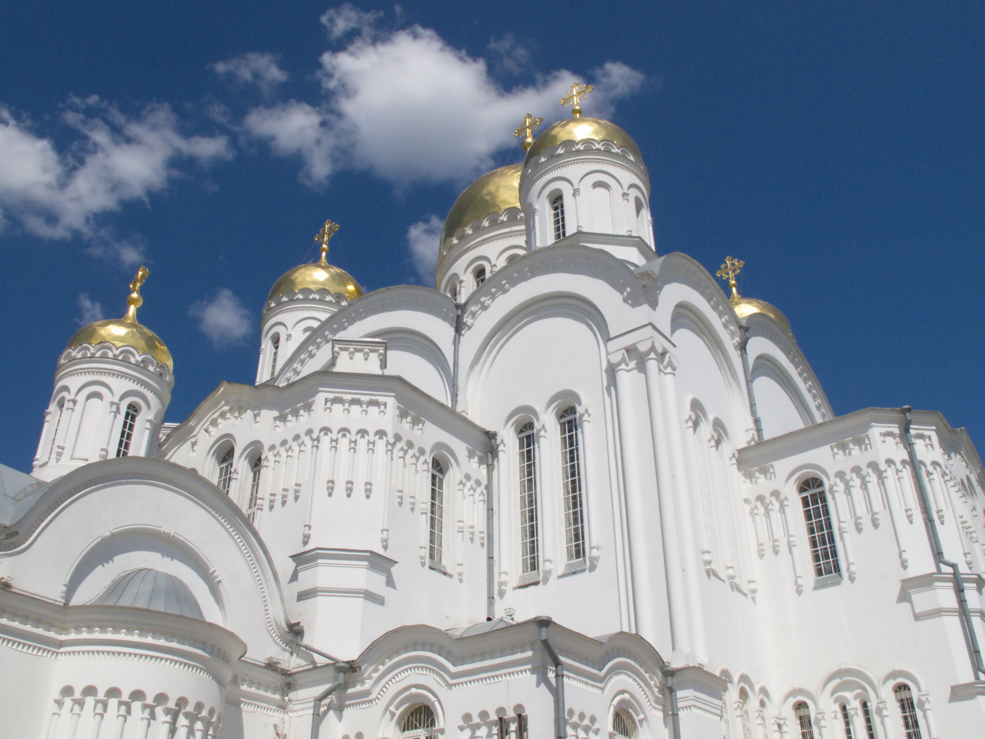 Спасо-Преображенский собор Серафимо-Дивеевского монастыря, Россия, Дивеево, 22 мая 2012 г.